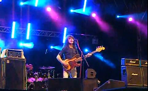 Budgie w 2009